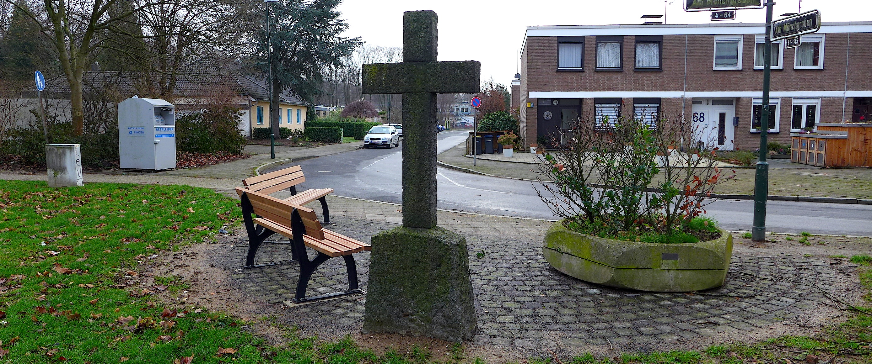 Дюссельдорф-Бенрат. Улица Ам Мёнх-грабен.